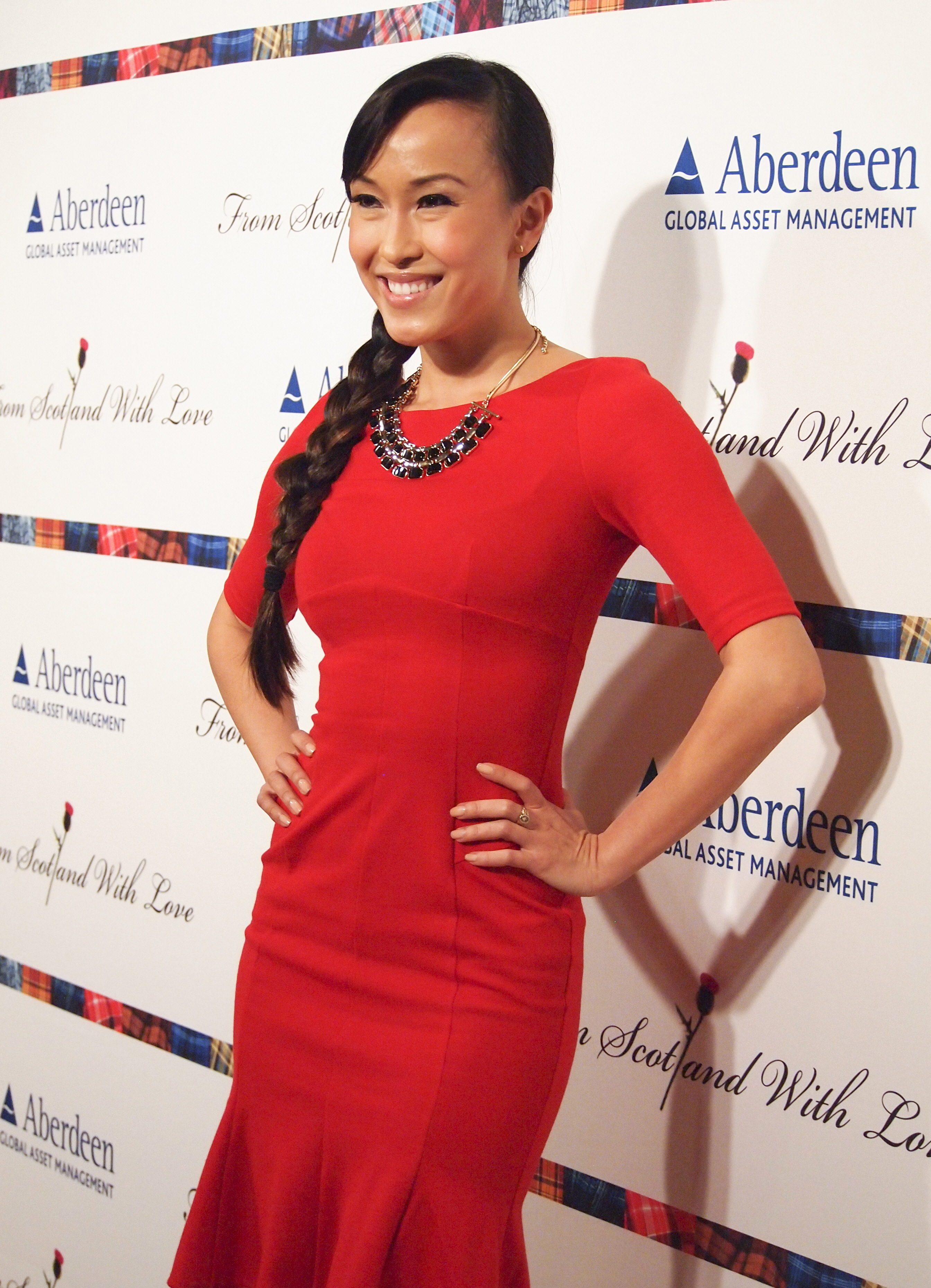 BaiyuChen_040813_07